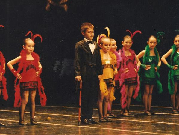 Hugo Bonemer, como Charleston, aos 10 anos.